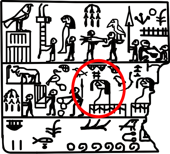 Jahrestäfelchen des ägyptischen Königs Djer (1. Dynastie). Der rote Kreis verweist auf Königin Penebui.